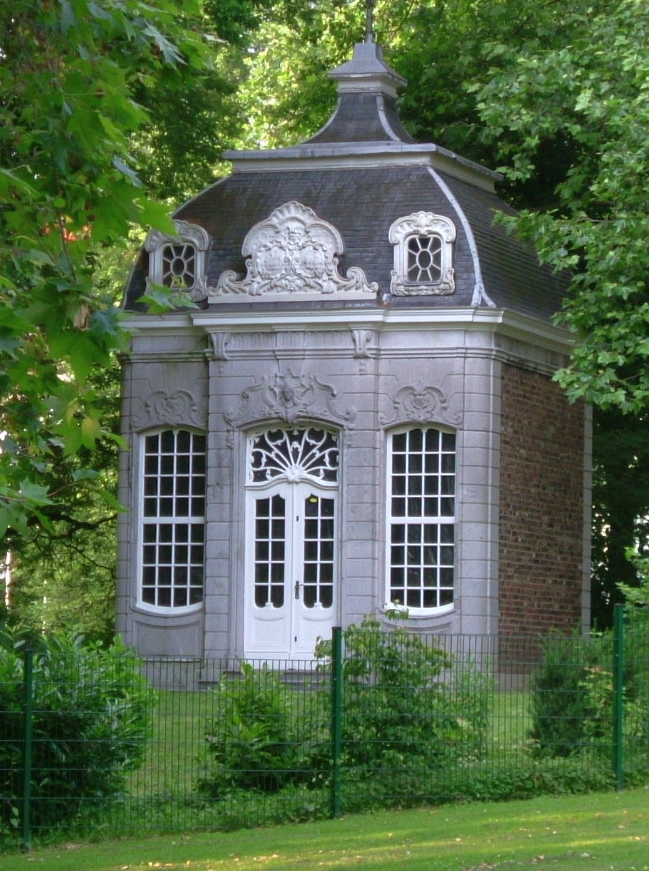 Couven-Gartenpavillon aus dem Nuellens-Hotel (Friedrich-Wilhelm-Platz,zerstört), transloziert in den Burtscheider Kurgarten